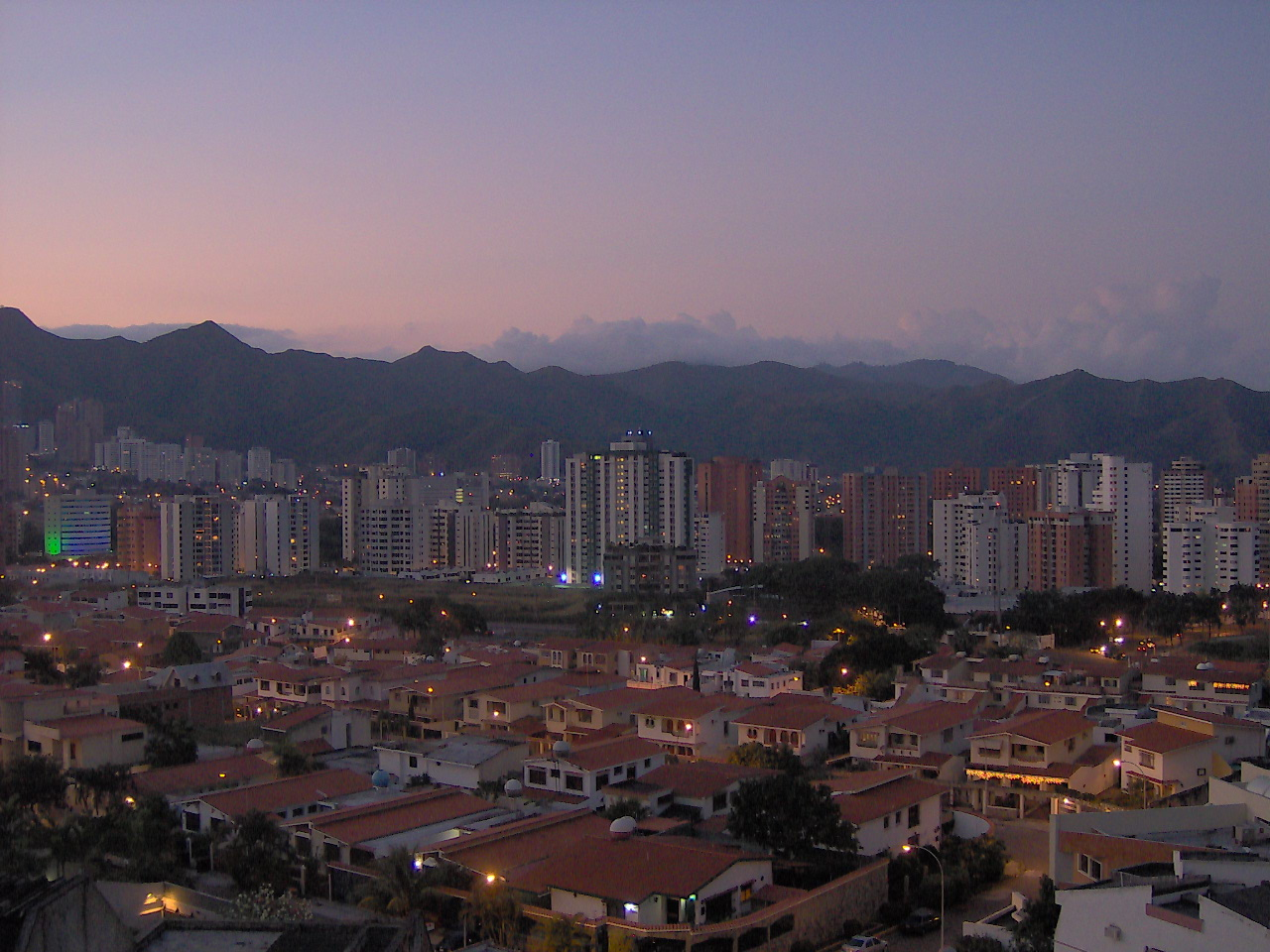 Esta es una vista de la ciudad de Valencia (Venezuela). La imagen fue tomada el 3 de Diciembre del año 2005, desde el área de la piscina del la residencia Terrazas del Paraiso y muestra parcialmente la zona norte de la localidad.